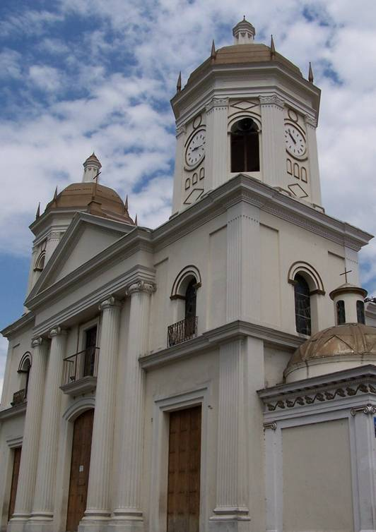 Fachada iglesia Guacara